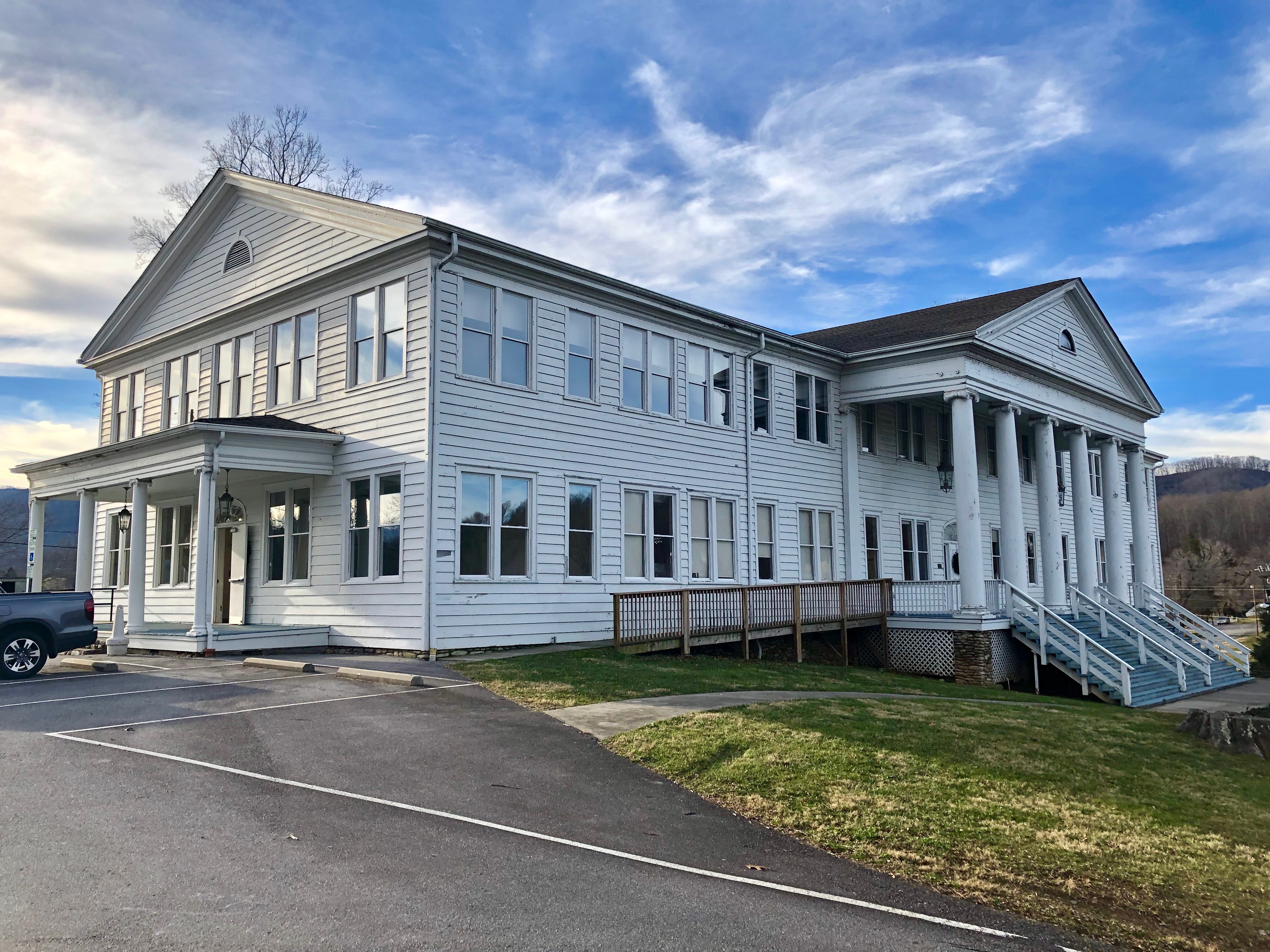 Shackford Hall, Lake Junaluska, NC